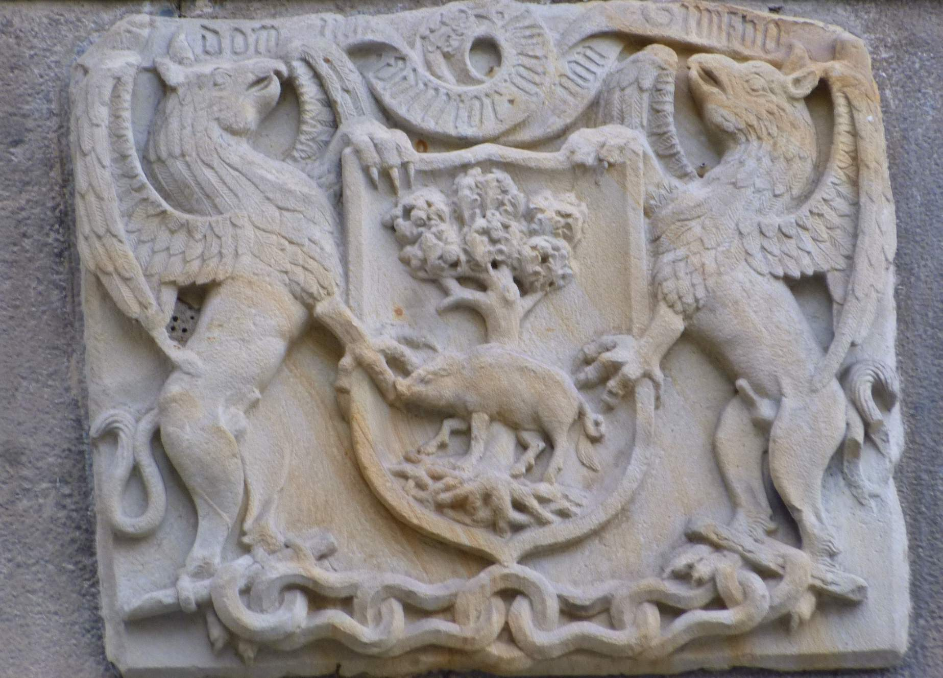 Jauregi etxea (Bergara, Gipuzkoa)